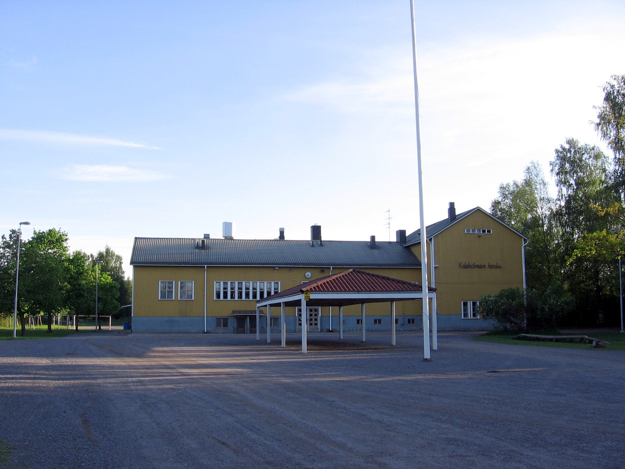 Kalaholman koulu